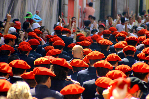 Alarde tras el chupinazo, Pamplona, 6 de julio.